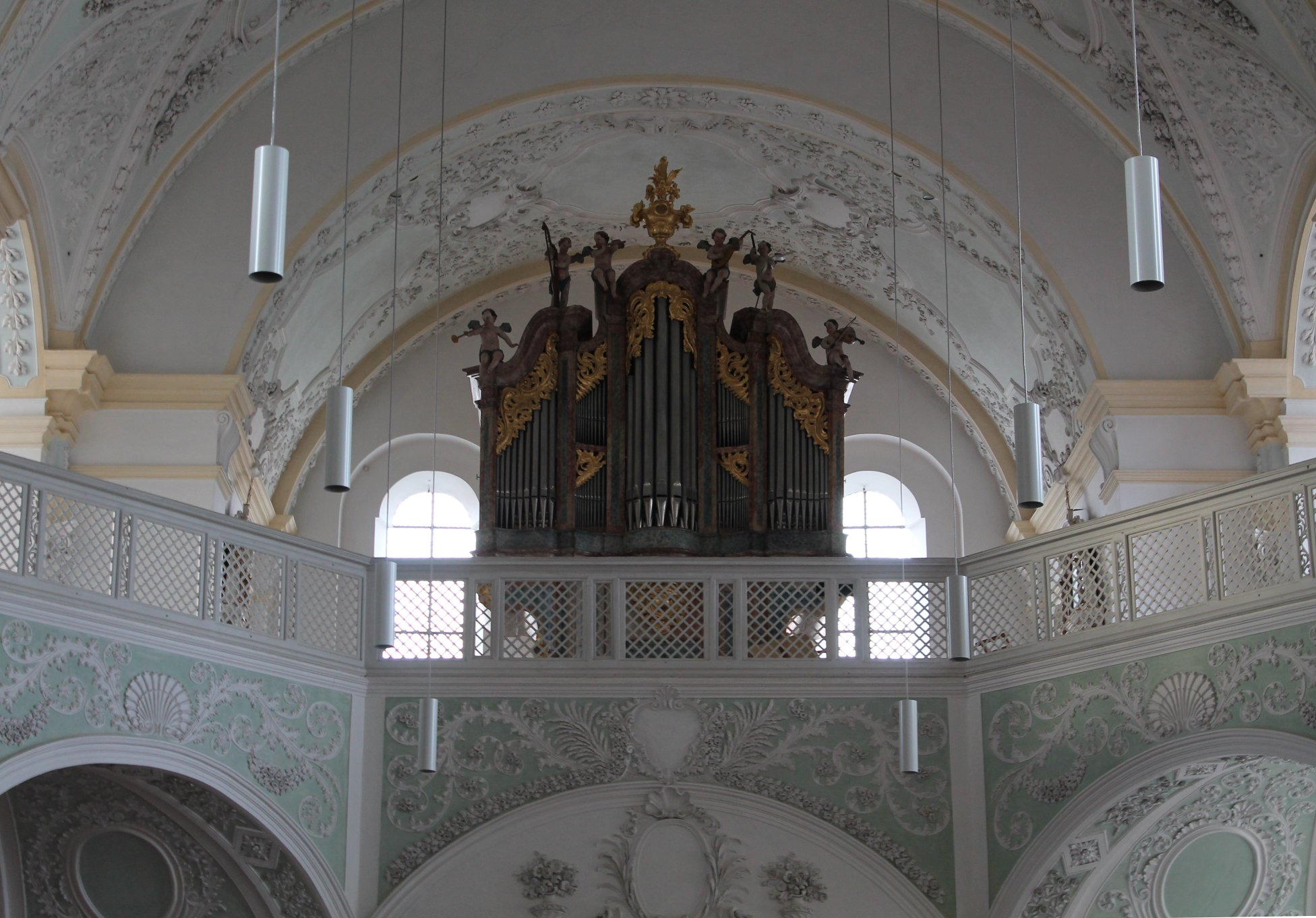 Orgel der Klosterkirche Attel (2013, Alois Linder, II/24; Prospekt und einige Register von Anton Bayr von 1769)